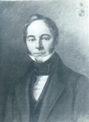 portrait du comte de Vorsselaer, Louis-Paul van de Werve.